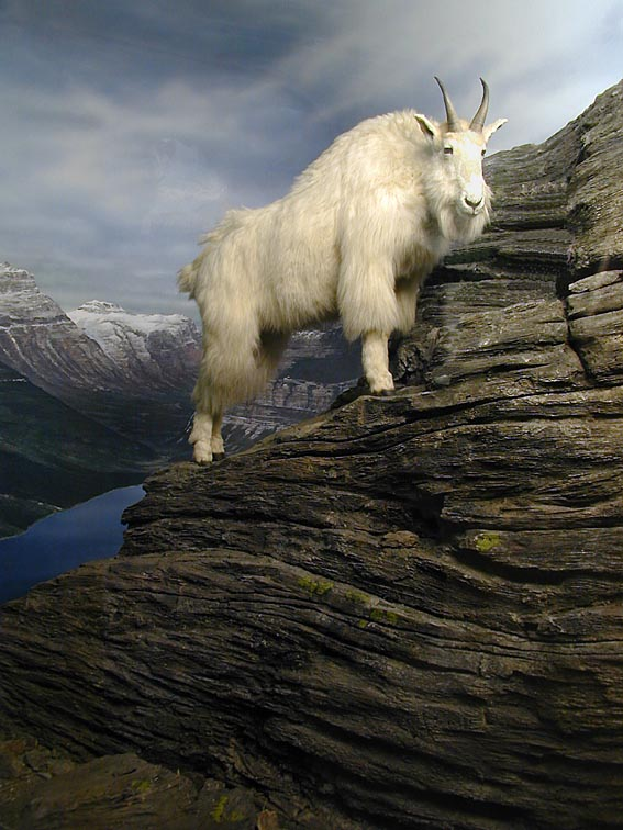 Un diorama rappresentante la capra delle nevi, al Museo civico di storia naturale di Milano